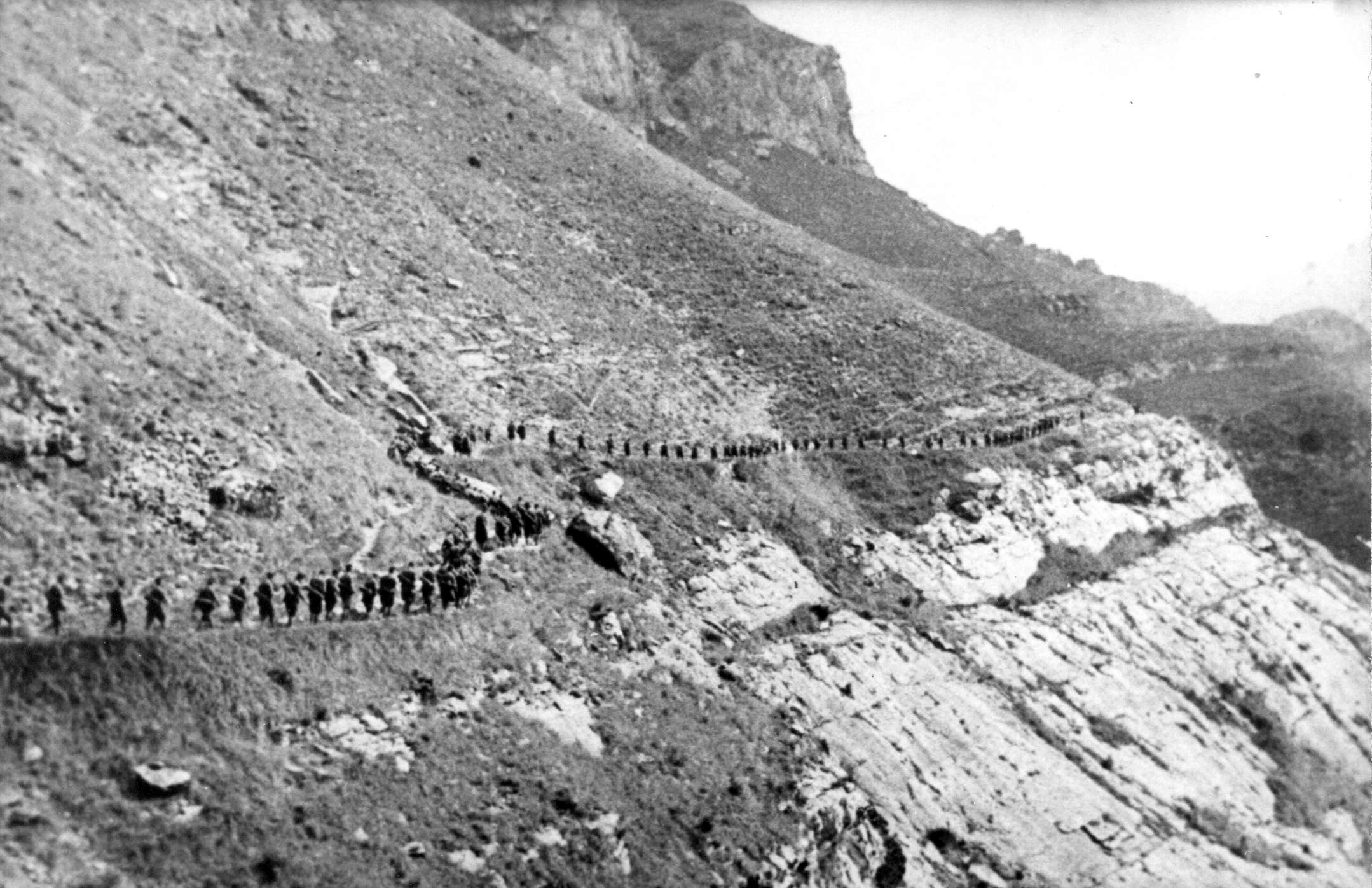 Srpskohrvatski / српскохрватски: Nemačka kolona 1. brdske divizije ispod Durmitora, 1943. godine, u toku operacije Švarc.